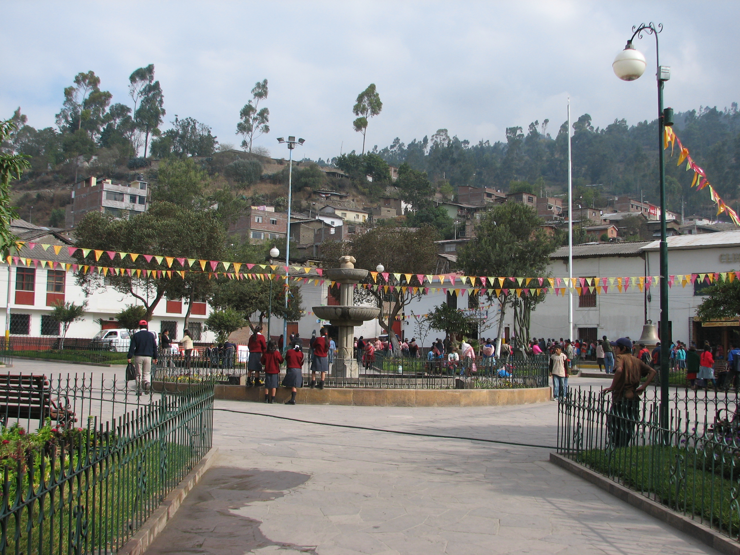 Central plaza in Andahuaylas, Peru